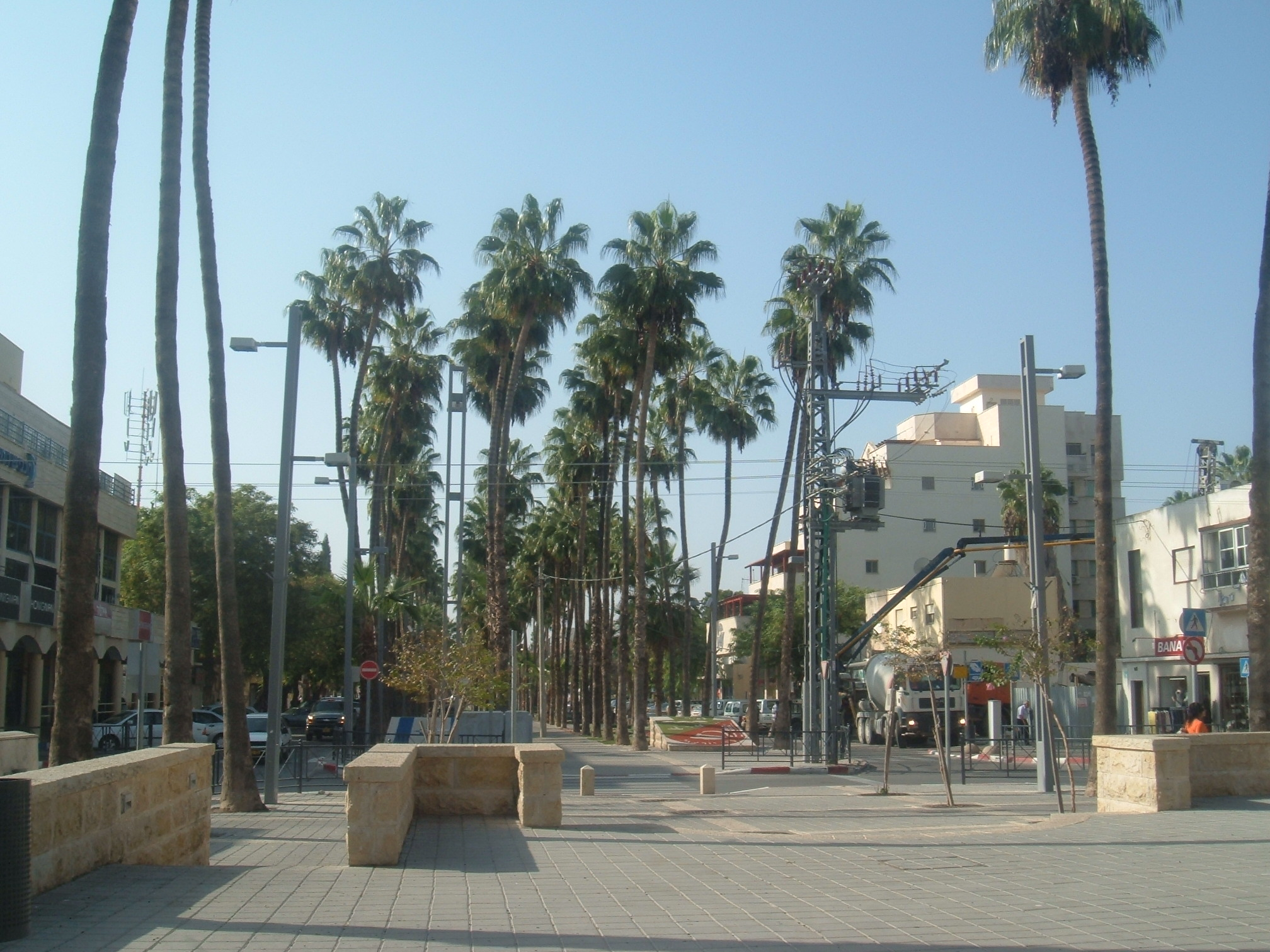 Washingtonia robusta in Arlosoroff blvd. Afula, Israel. עצי ושינגטוניה חסונה בשדרות ארלוזורוב בעפולה